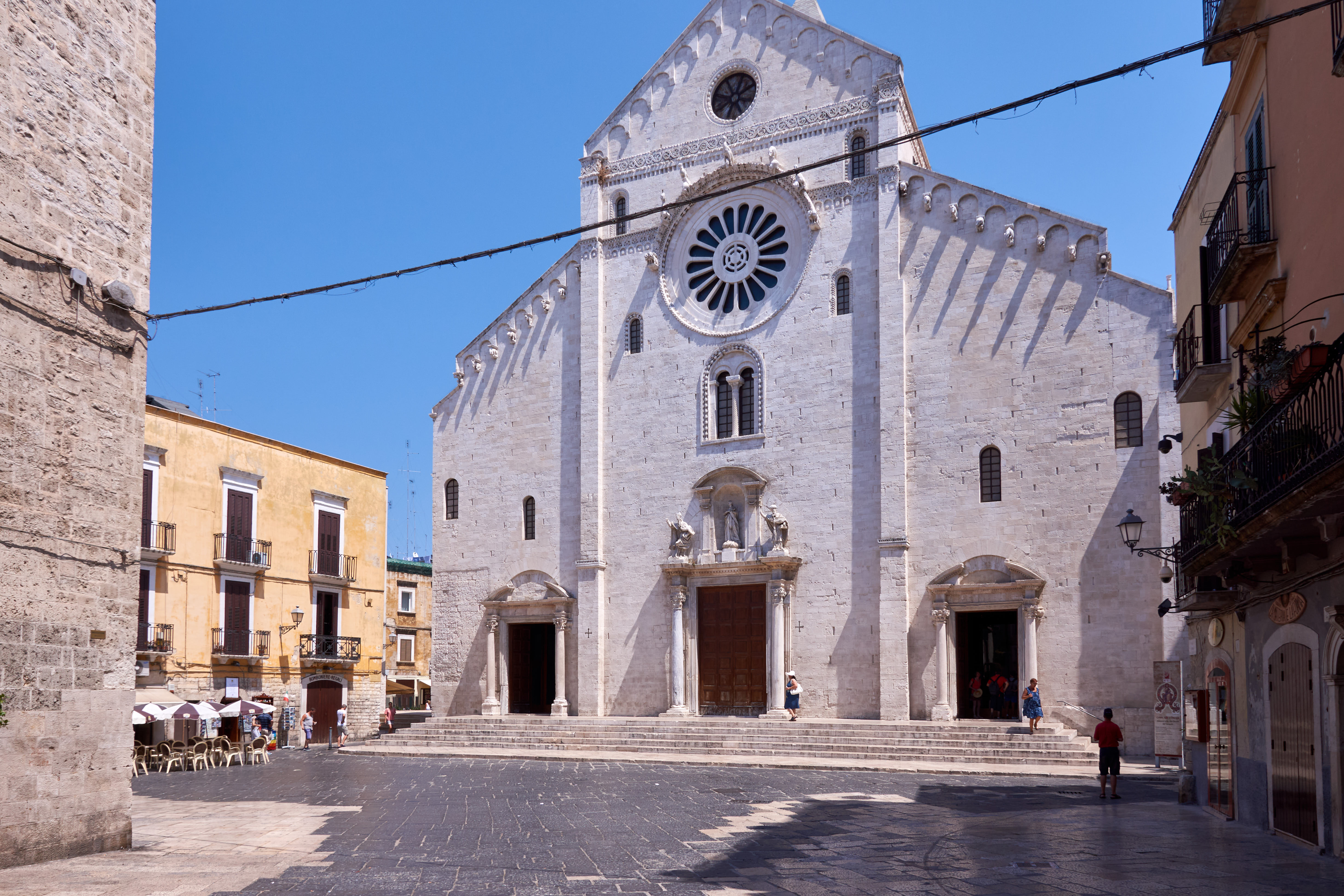 Façade de la Cathédrale de Bari (Italie)